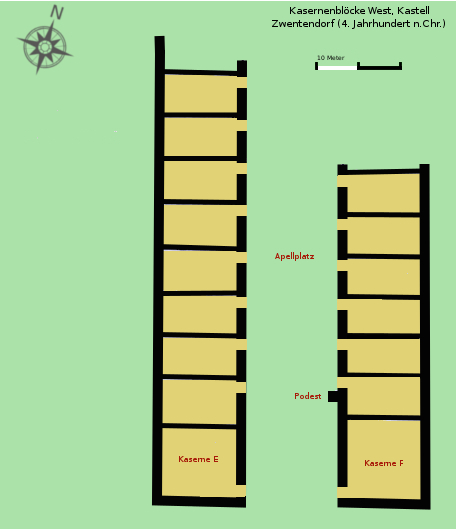 Befunde Kasernenblöcke West, Kastell Zwentendorf (A), Steinperiode II.